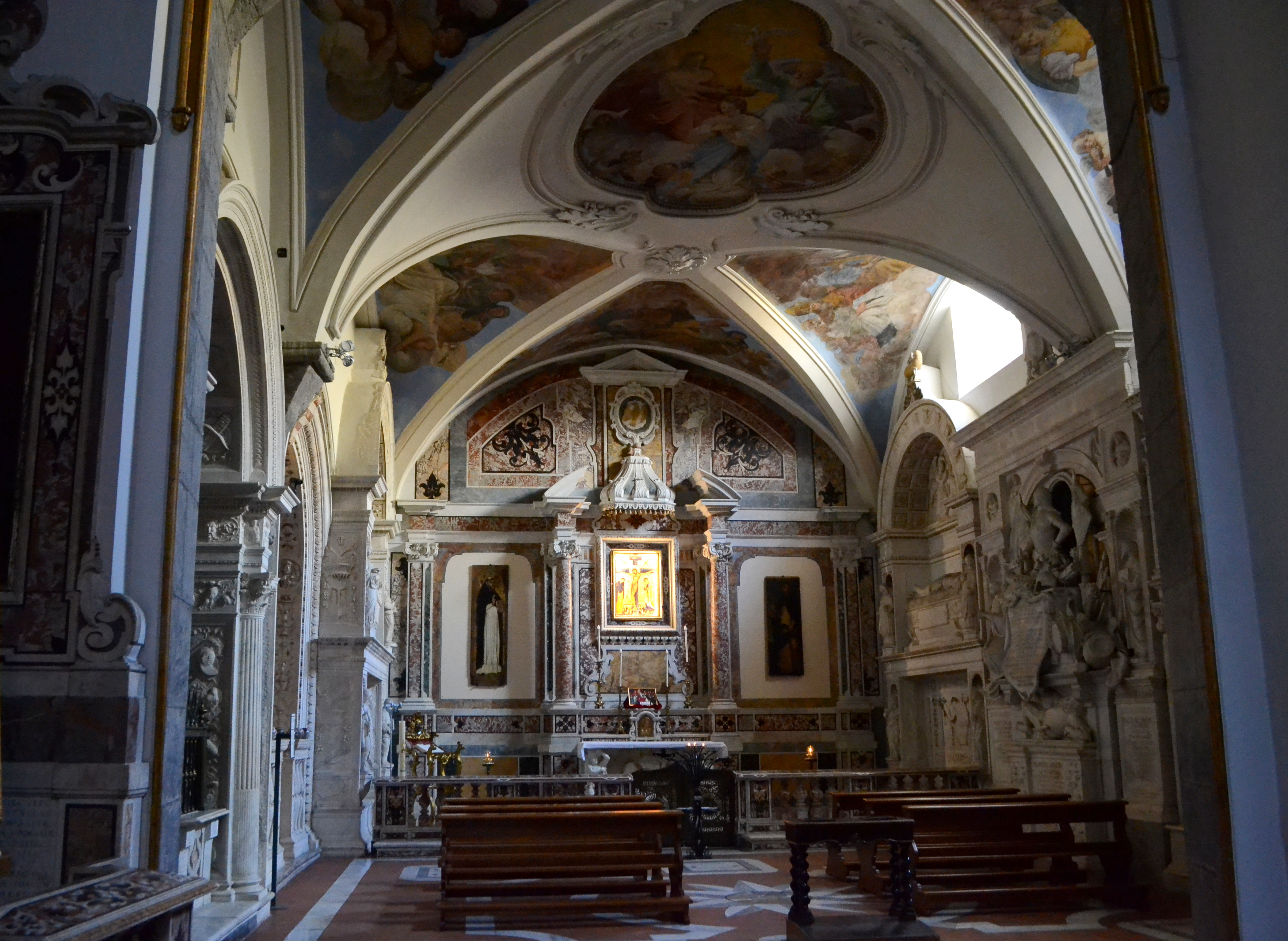 Cappellone del Crocefisso della chiesa di San Domenico Maggiore di Napoli. Interno visto dal vestibolo